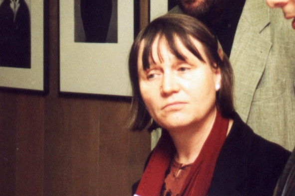 Anna Šabatová, tehdejší zástupkyně ombudsmana a patronka filmové přehlídky Duha nad Brnem při zahajovacím večeru přehlídky v kině Art.